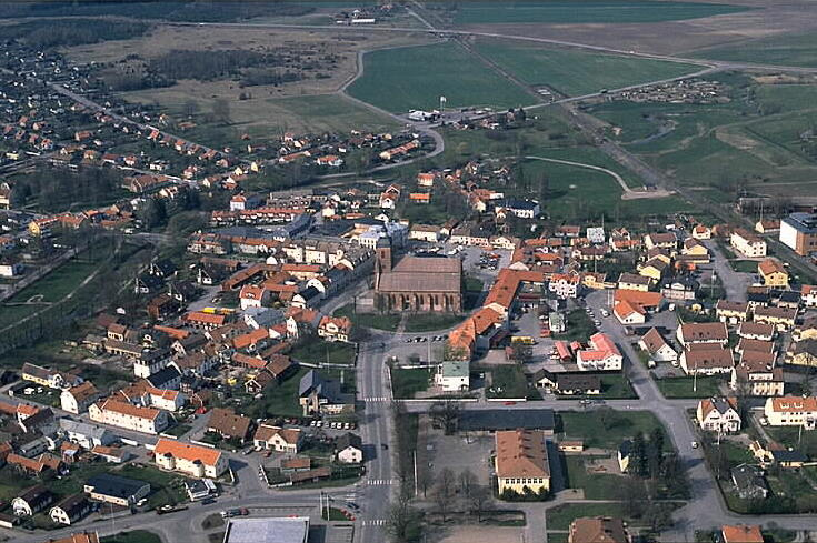 Motiv: Skänninge Nyckelord: Flygbilder, Riksintressen Kategori: StadsmiljöSkänninge